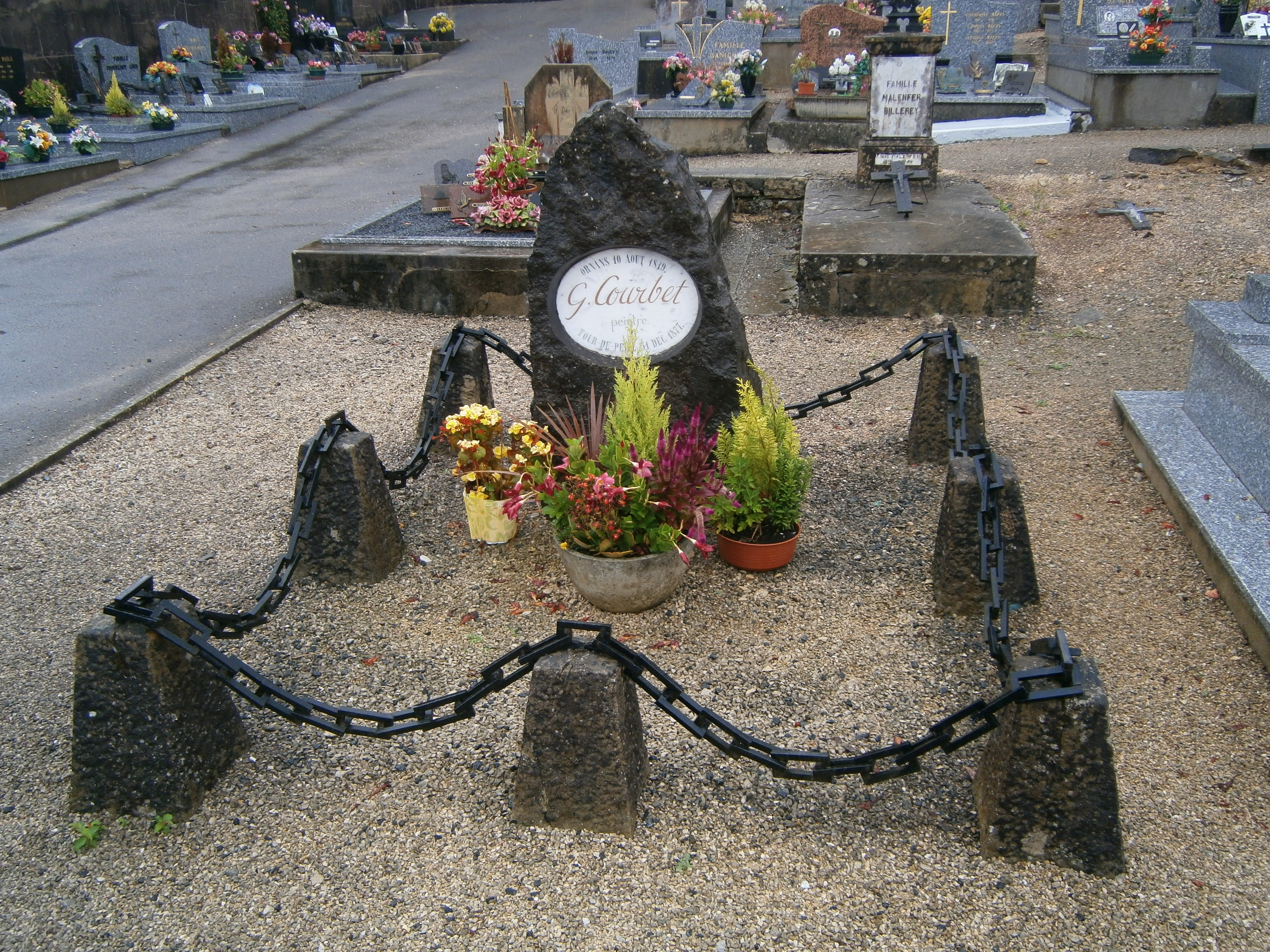 Cimetière d'Ornans, stèle à Gustave Courbet.